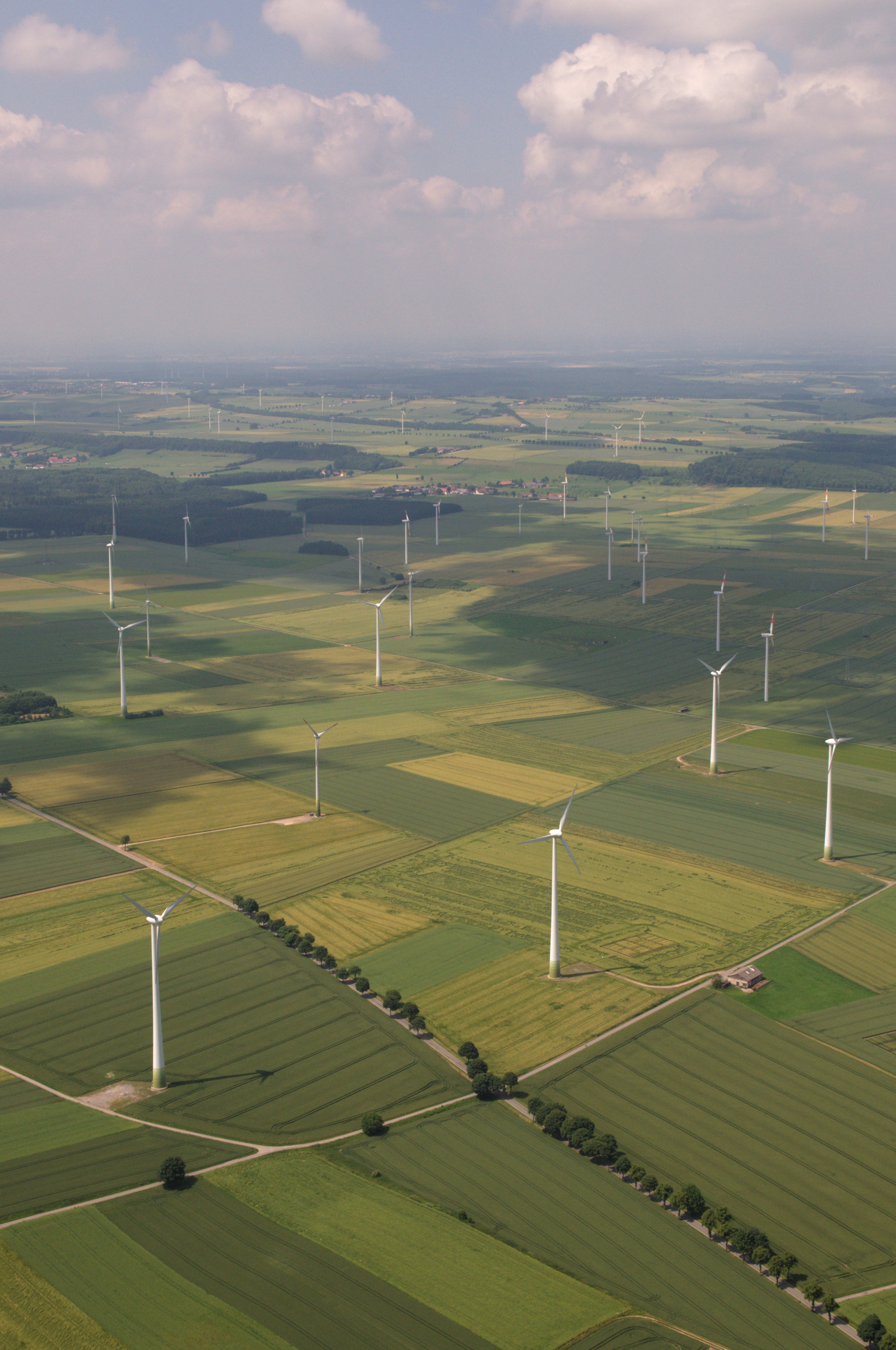 Fotoflug Sauerland-Ost: Windkraftanlagenpark Sintfeld, westlich von Meerhof, L636; Blickrichtung Nordwesten auf Elisenhof.